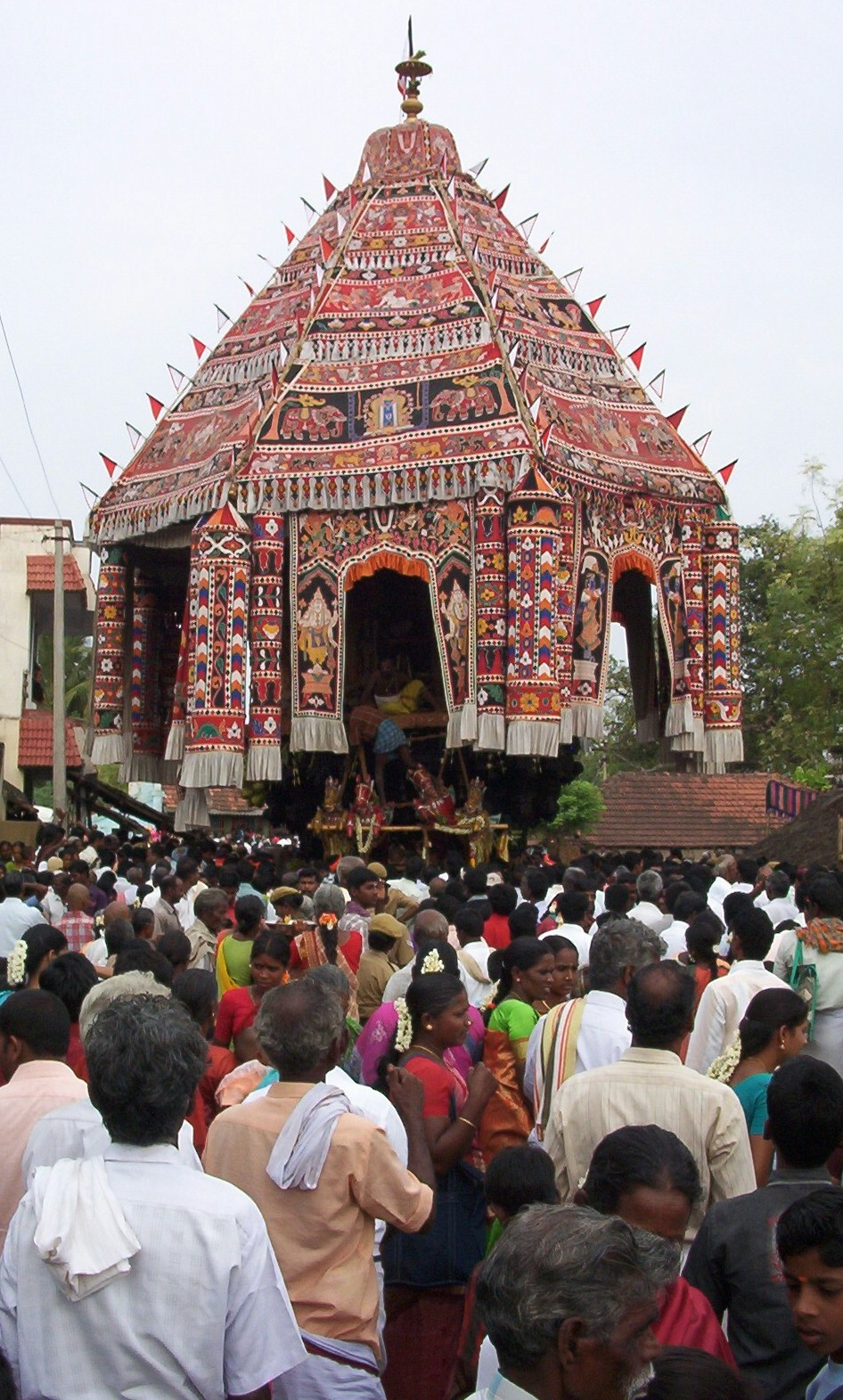 kallankurichi car festival